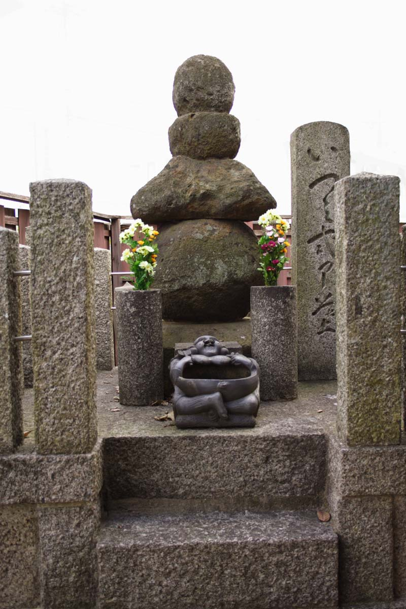 a tomb of Izumi Shikibu(和泉式部)